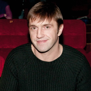 Владимир Вдовиченков на премьере фильма «Мы из будущего 2» в кинотеатре «Октябрь»